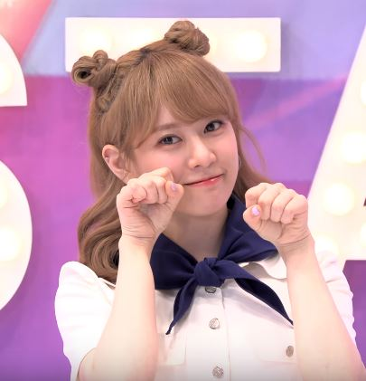 4일 오후 서울 마포구 상암동 tbs 오픈스튜디오에서 ‘tbs 팩트인스타 - ‘체리블렛’편 녹화가 펼쳐져 체리블렛 보라가 포토타임을 갖고 있다.